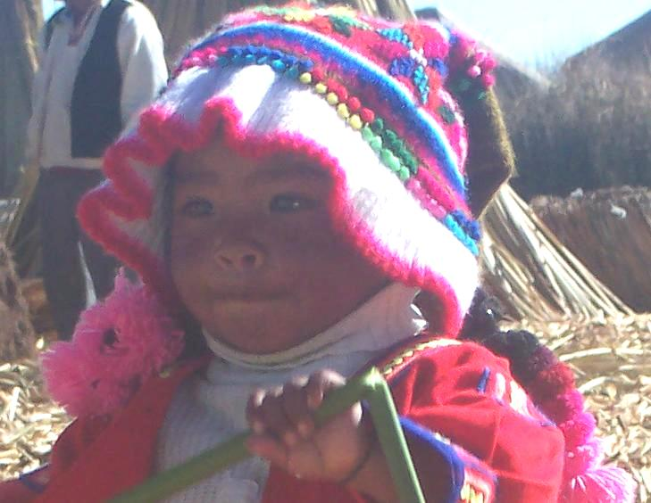 Uro. Niña de la comunidad de los Uros Autor: Alfredobi Fecha: Agosto 2006